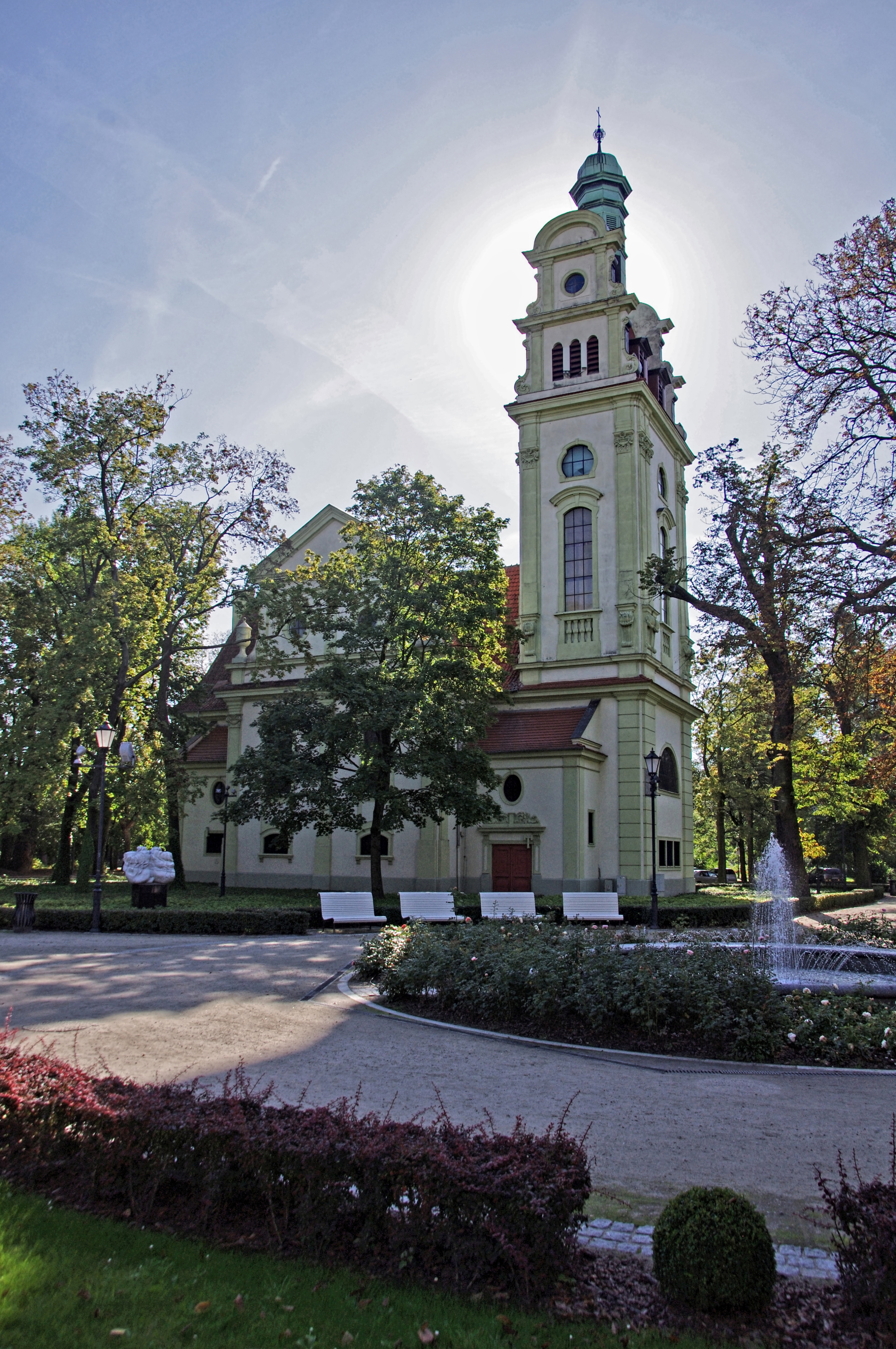 Sopot, ul. Parkowa 5 - Ewangelicko-Augsburski kościół Zbawiciela, 1919.